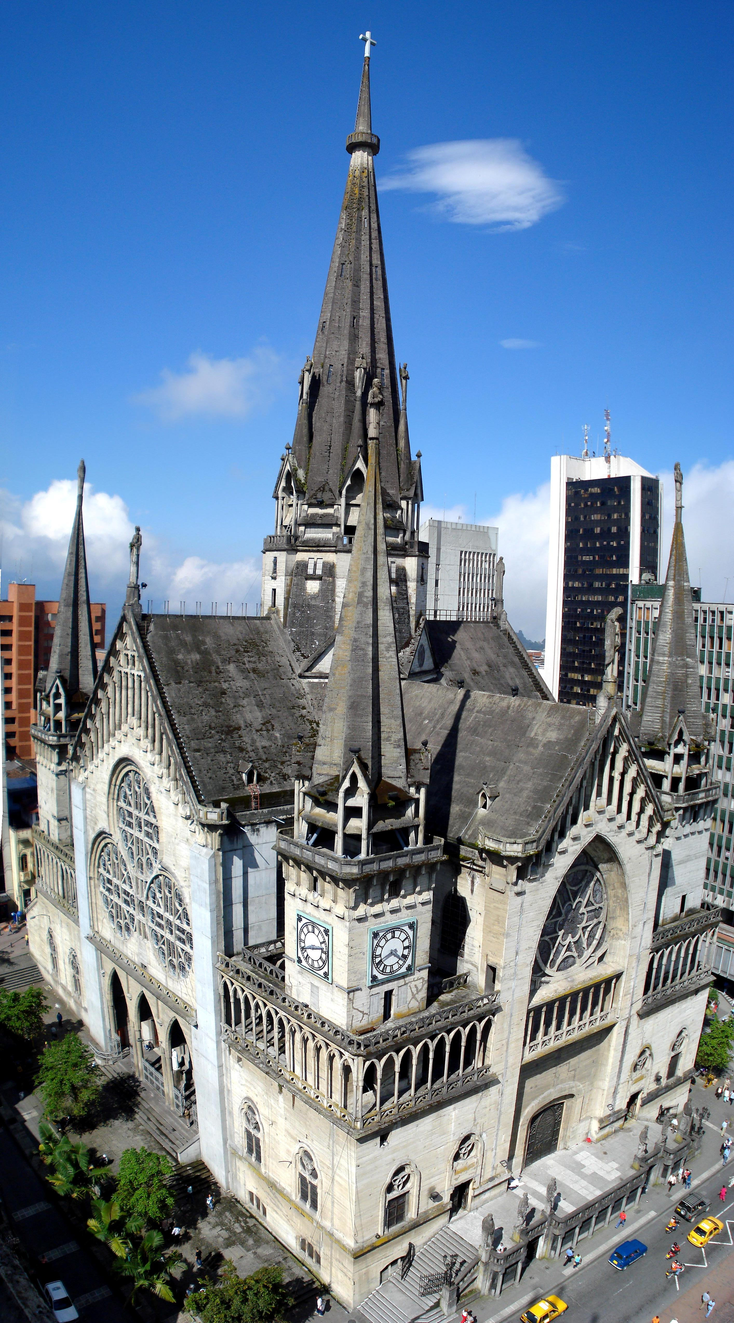 Vista de la Catedral de Manizales en el departamento de Caldas, Colombia.